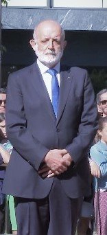 El director general de la Guardia Civil, Félix Azón en Salamanca.